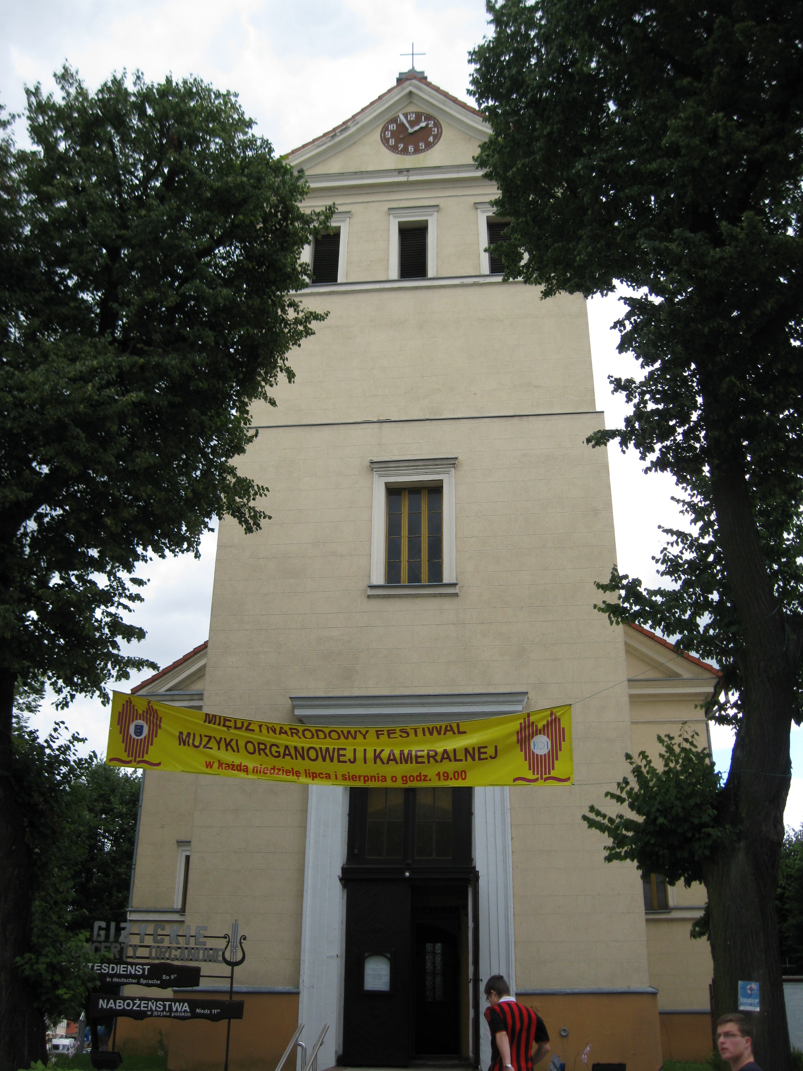 Giżycko - zespół kościoła ewangelickiego: kościół (zabytek nr A-3244 i 1827 z 18.12.1991)